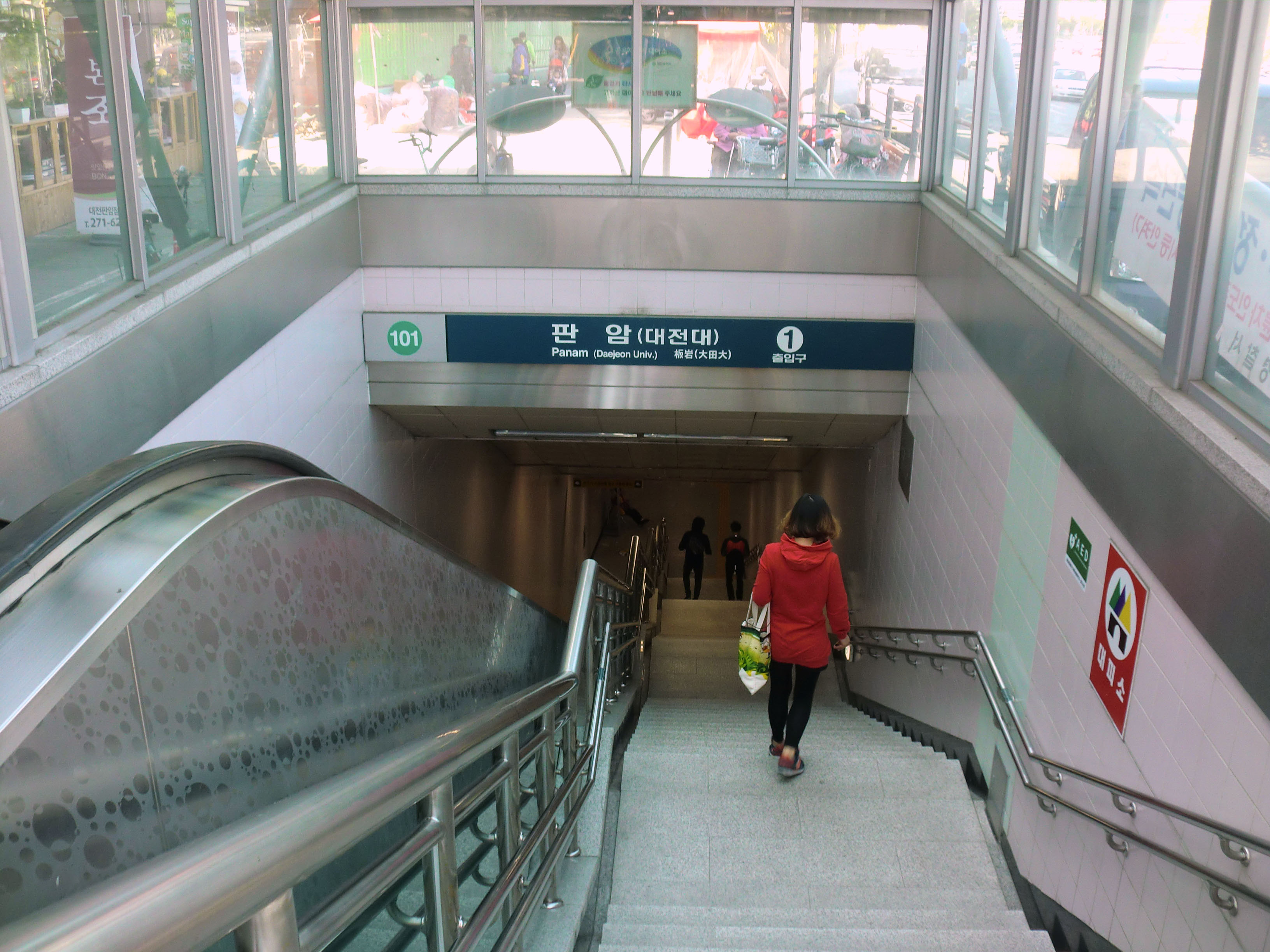 대전도시철도 1호선 판암역 1번출구